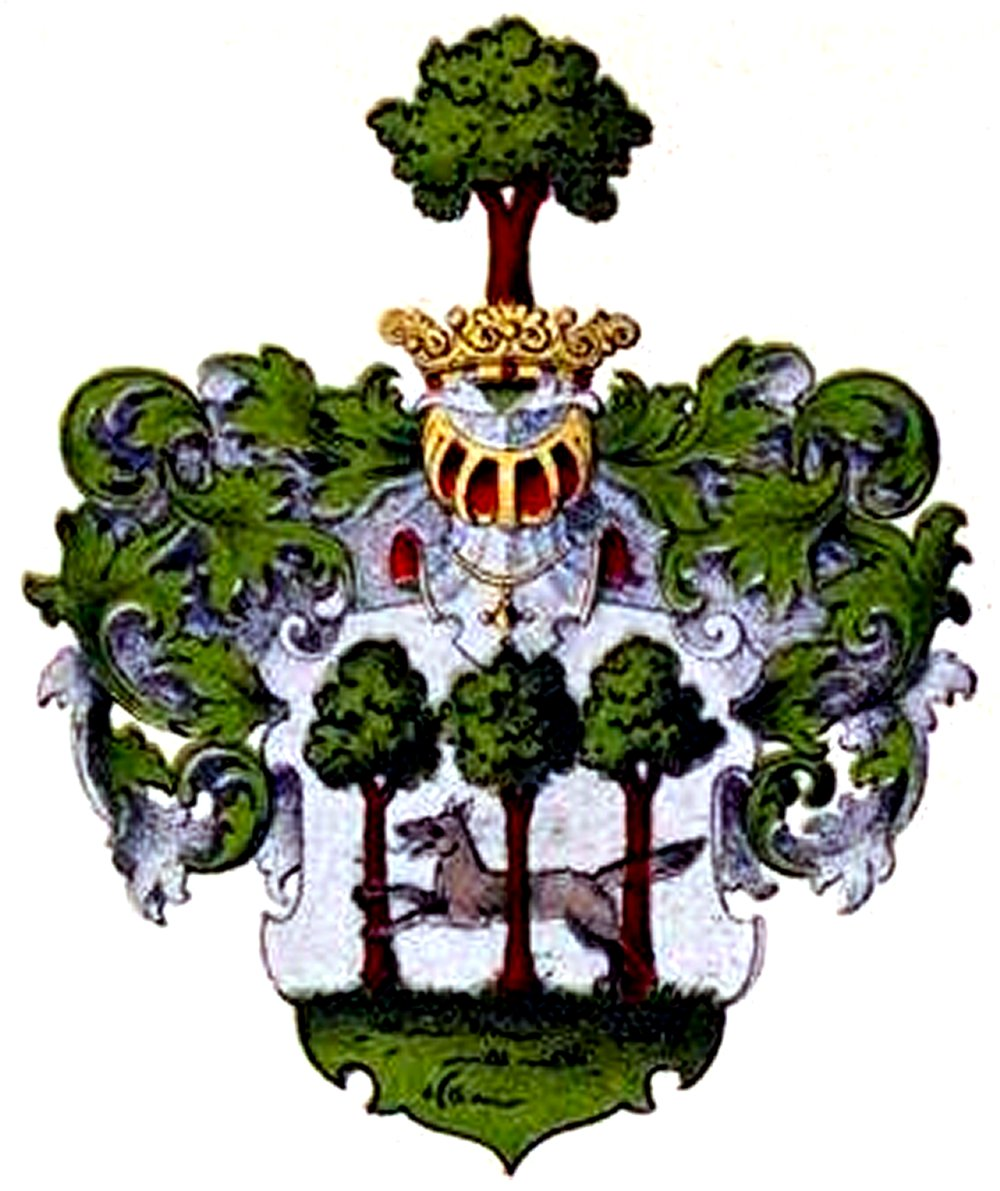 Grote suguvõsa aadlivapp